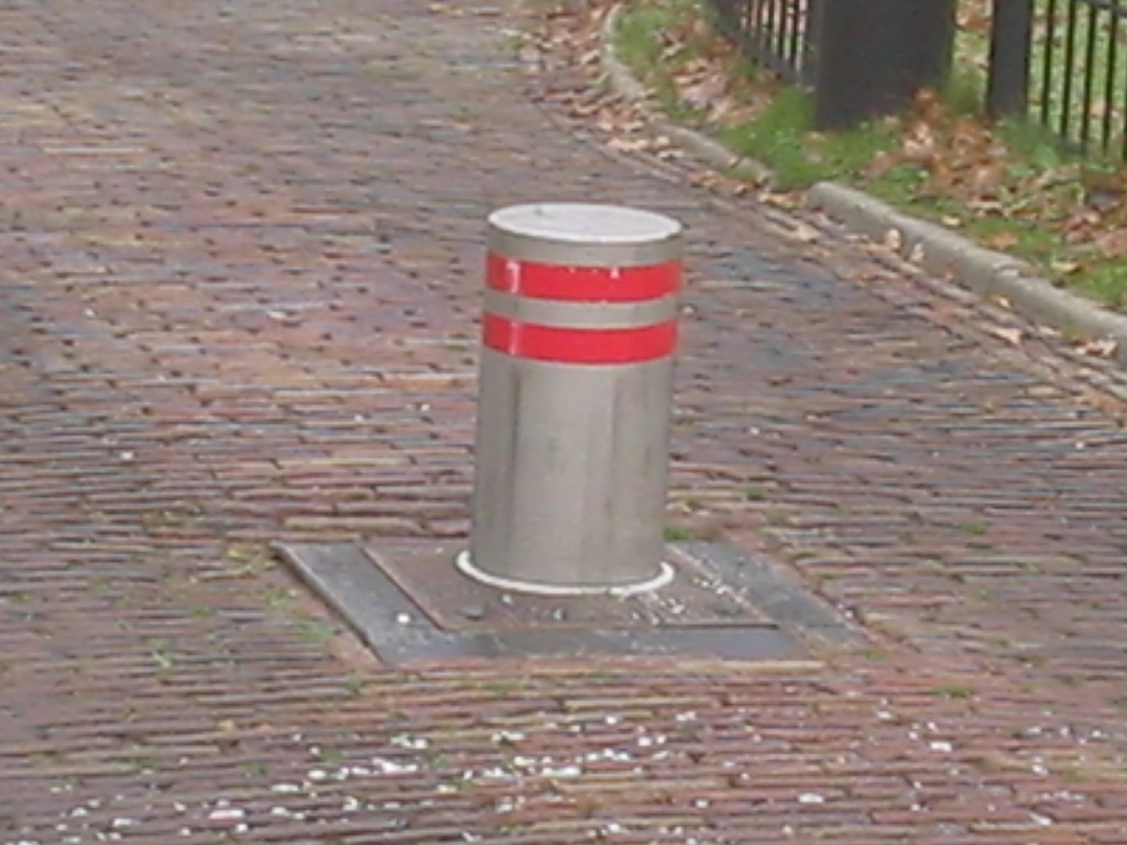 poller, 2004